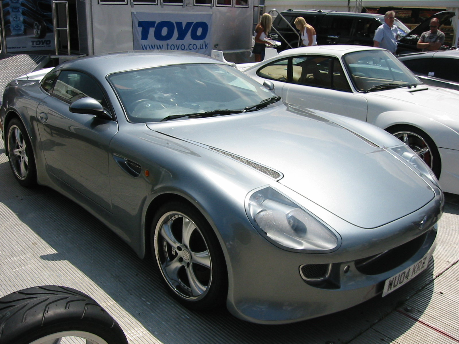 Invicta S1